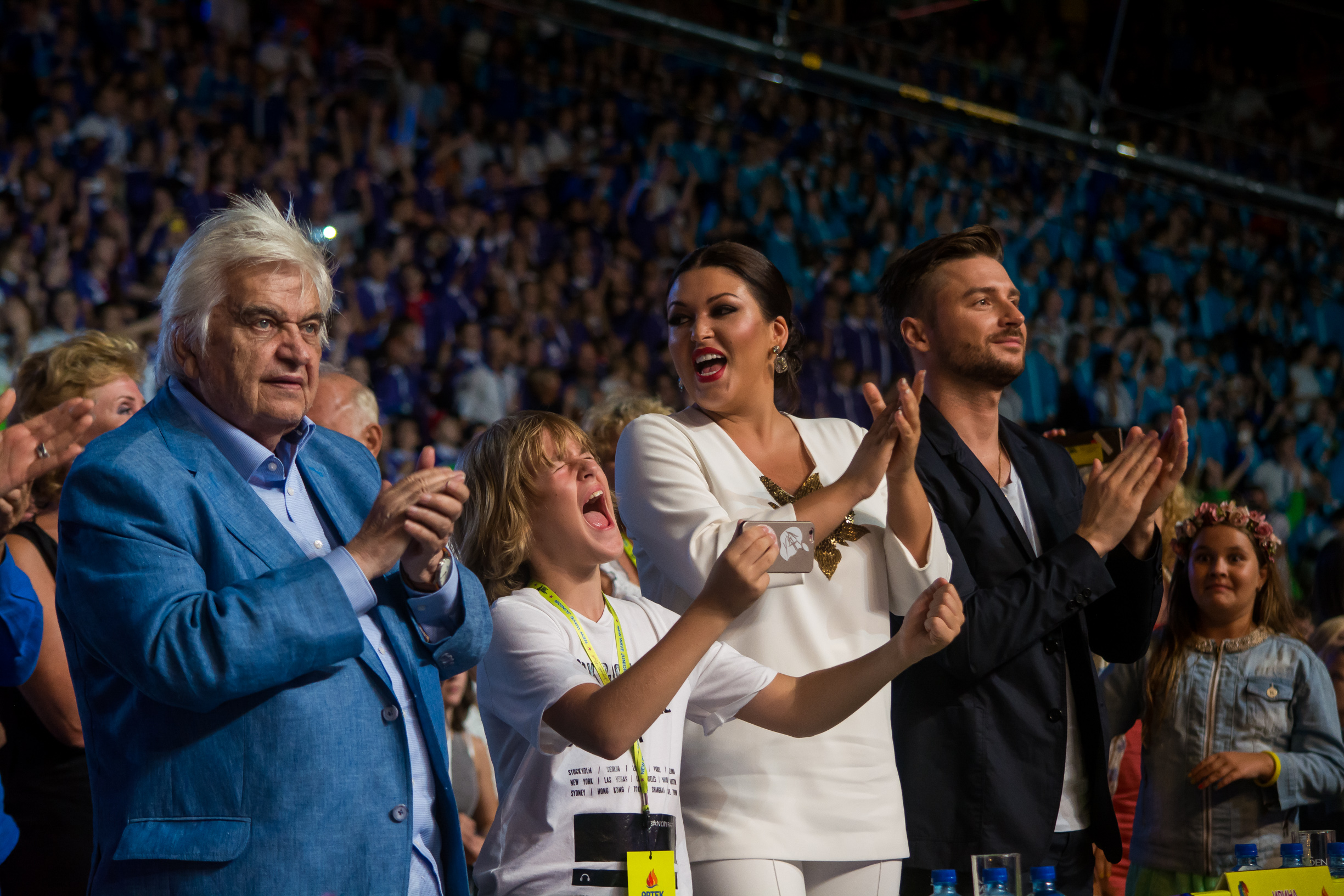 Жюри на Детской Новой волне 2016 (Евгений Крылатов, Ирина Дубцова с сыном Артёмом, Сергей Лазарев)